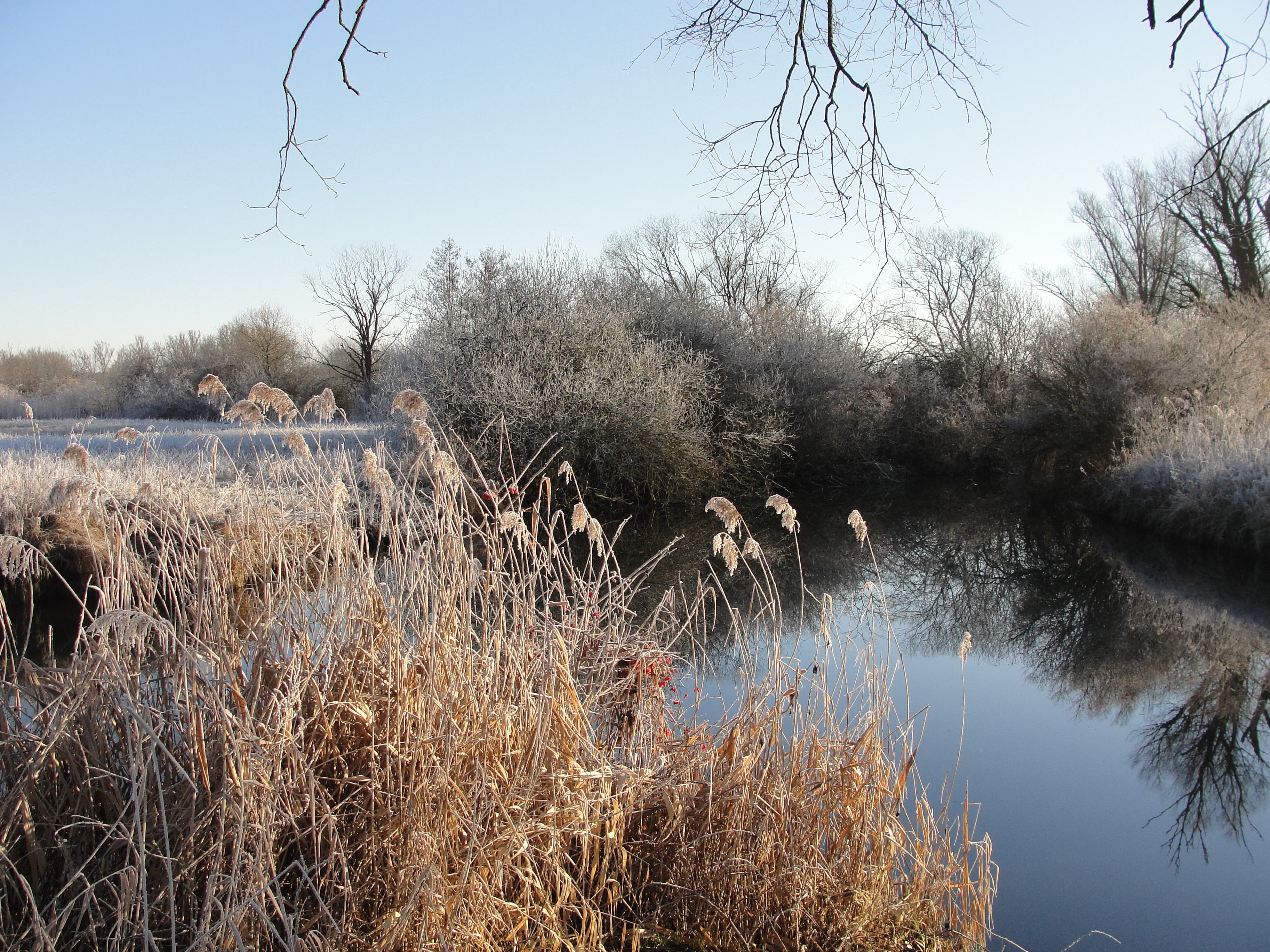 Alltwasserarm der Paar im Winter (LSG Paartal bei Waidhofen)